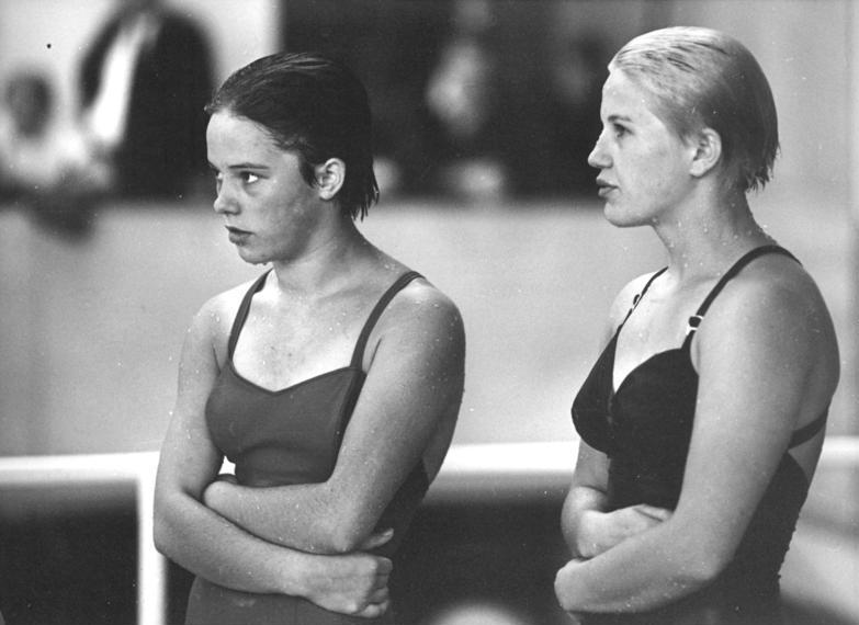 Zentralbild-Kohls Stu-Qu 21.8.1964 Die Olympia-Ausscheidungen... der Wasserspringer wurden am 20.8.1964 im Agrippa-Bad von Köln mit den Kämpfen im Kunstspringen der Damen und im Turmspringen der Herren fortgesetzt. UBz.: Christiane Lanzke (links) und Ingrid Engel-Krämer (beide DDR) beobachten aufmerksam das Einspringen der westdeutschen Kontrahenten.